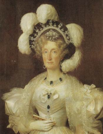 Maria Amalia von Neapel-Sizilien (1782-1866), Königin der Franzosen